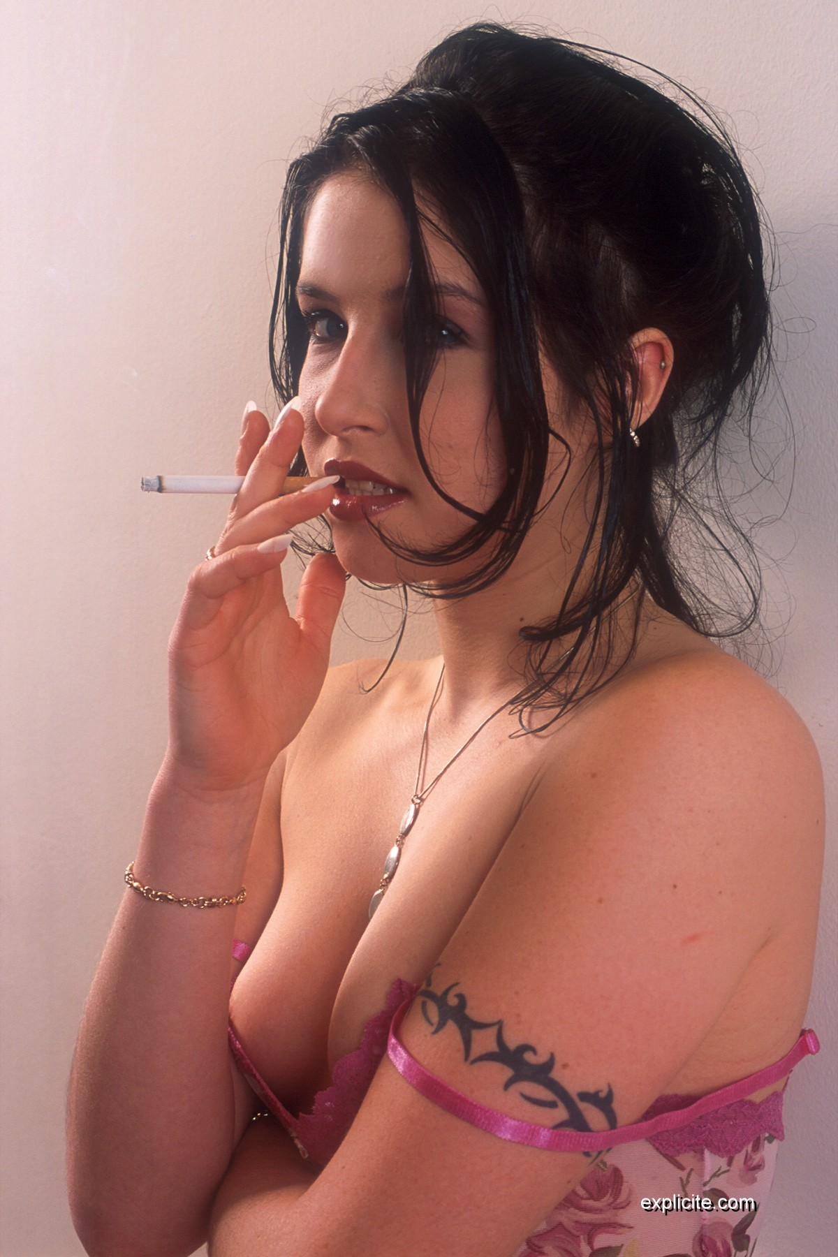 Tiffany Hopkins par John B. Root